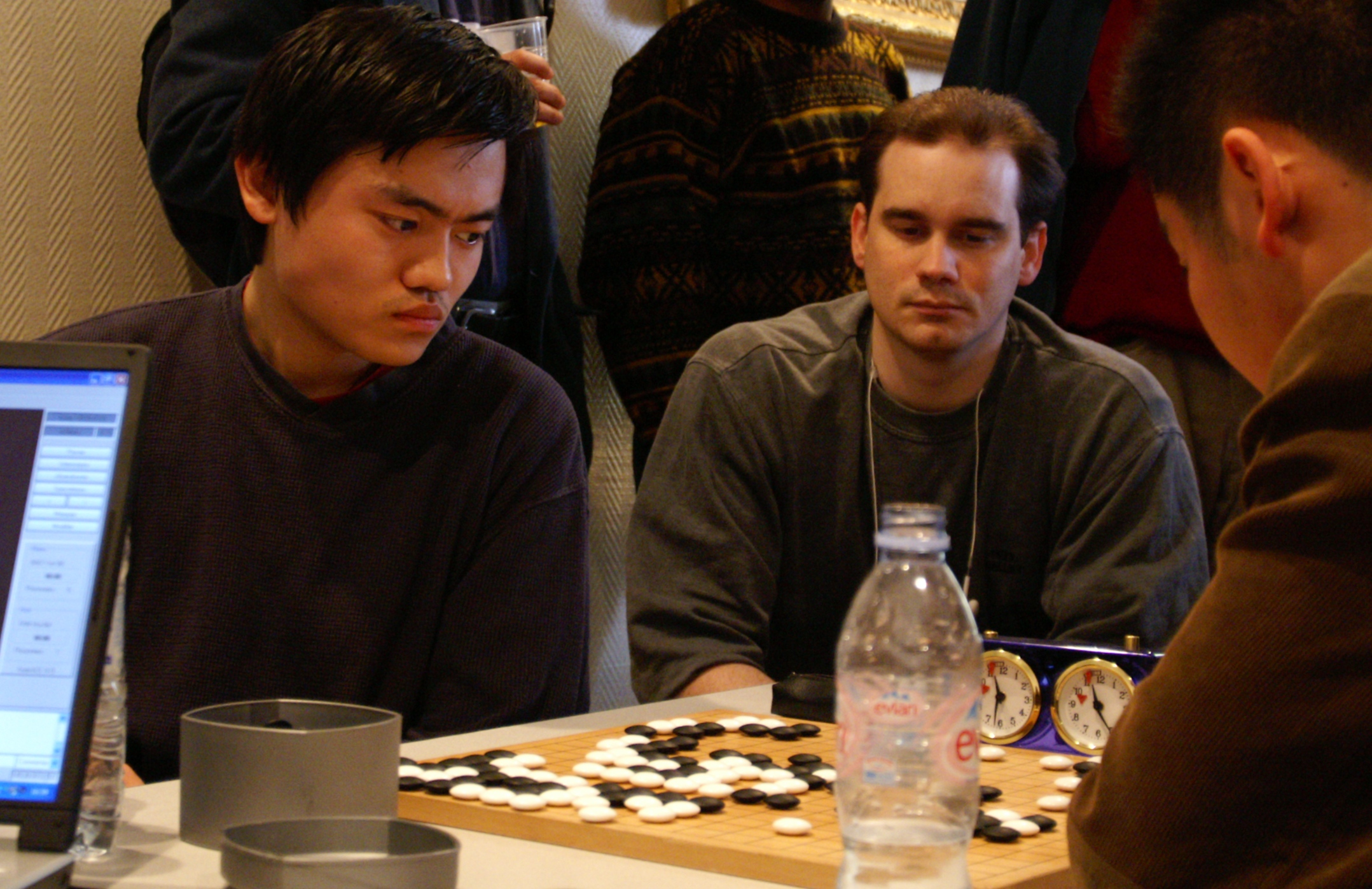 FAN Hui vs BAO Yun